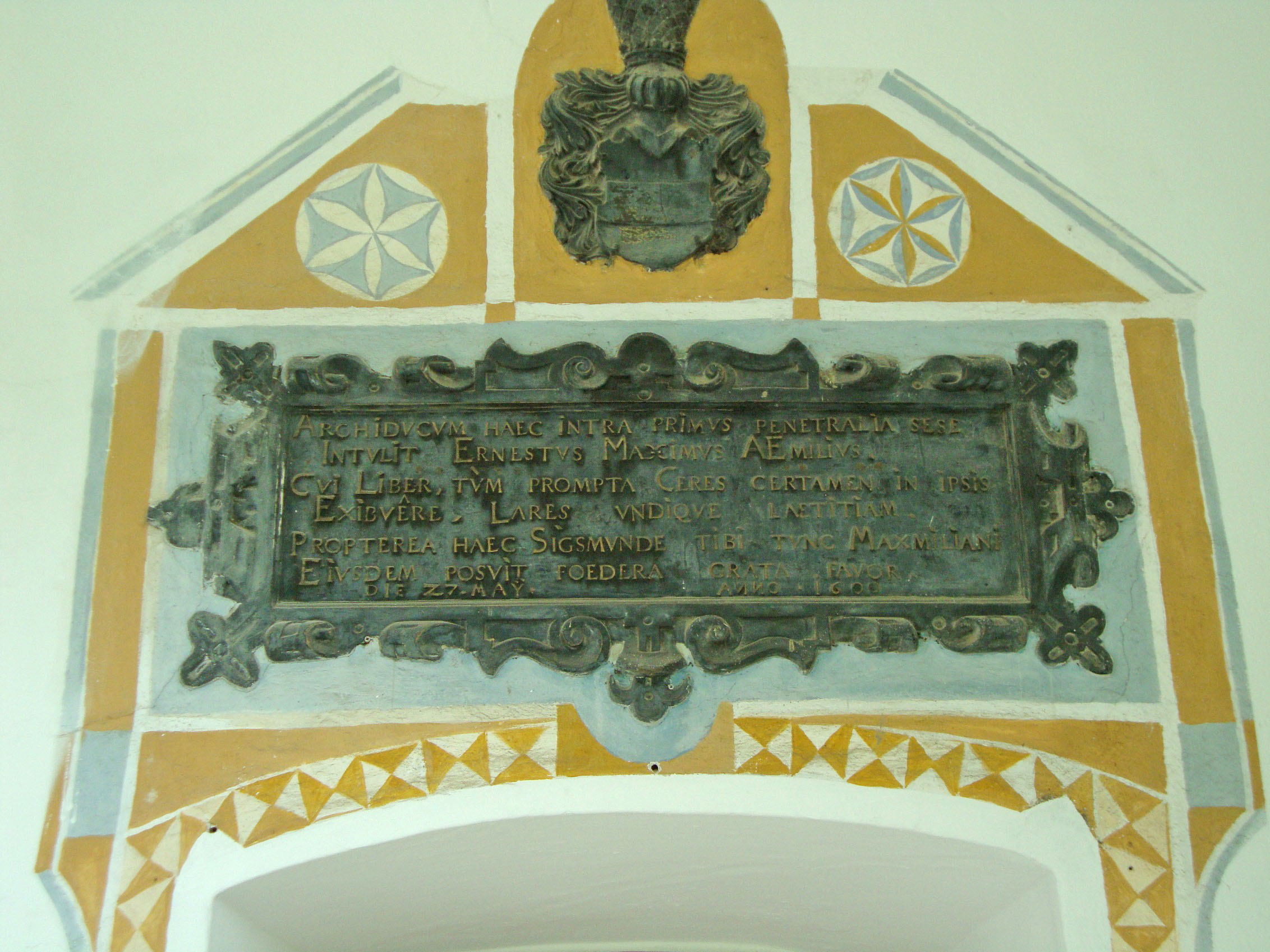 Heimatmuseum, ehem. Malteser-Schloss (Neues Schloss)